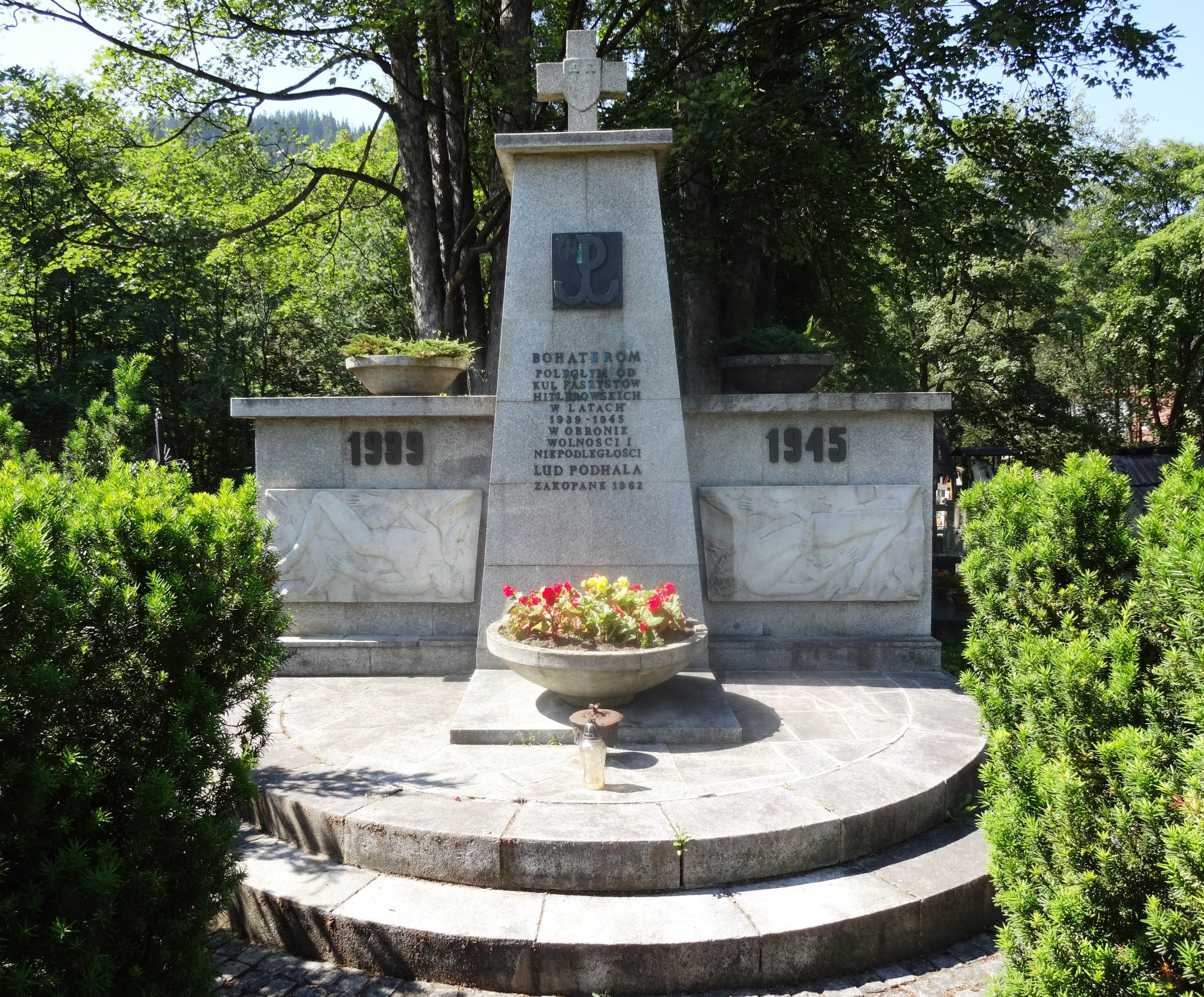 New Cemetery in Zakopane